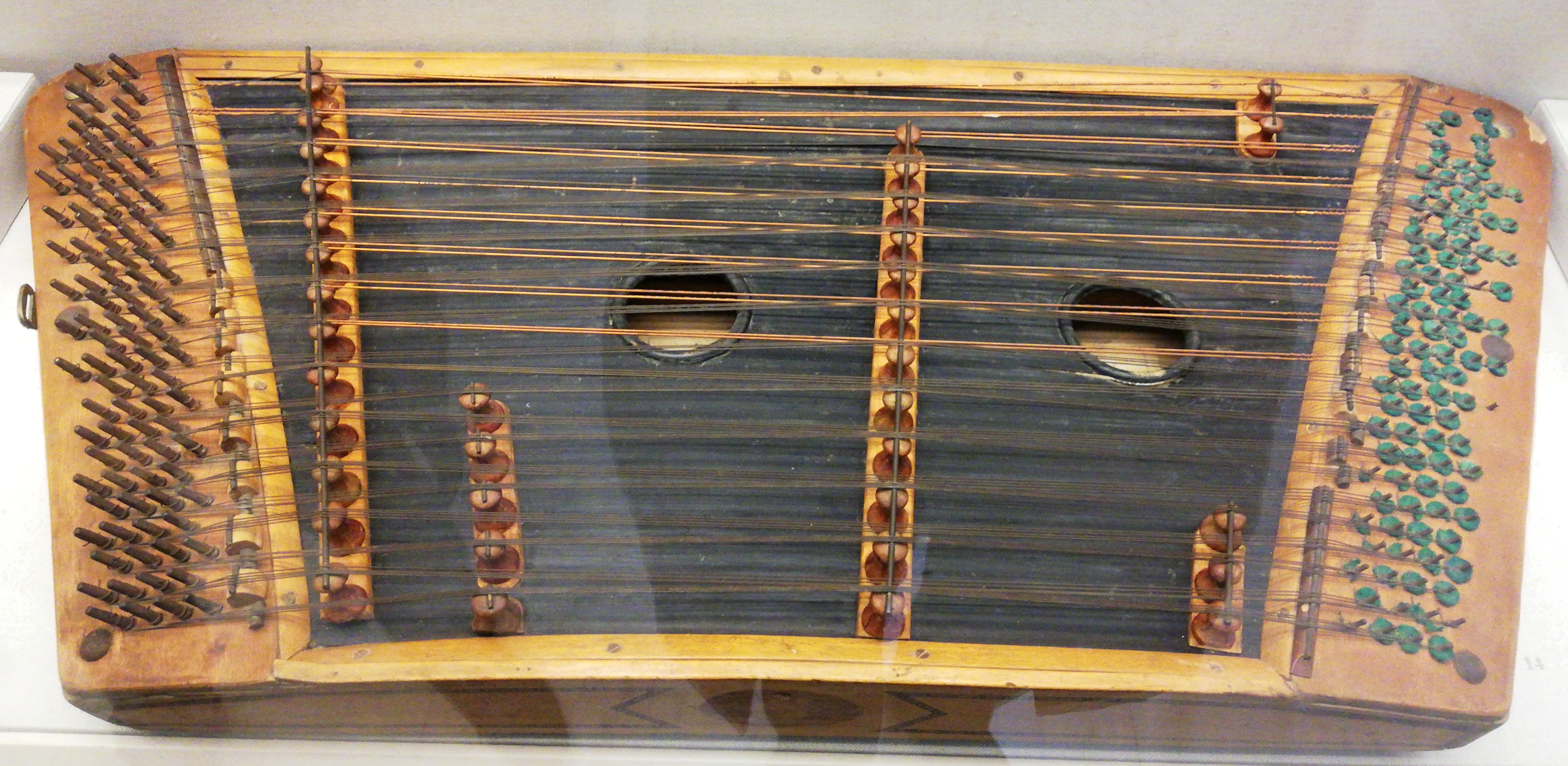 Un santouri, originaire d'asie mineure, popularisé en Grèce à partir de la fin de la guerre gréco-turque (1919-1922)